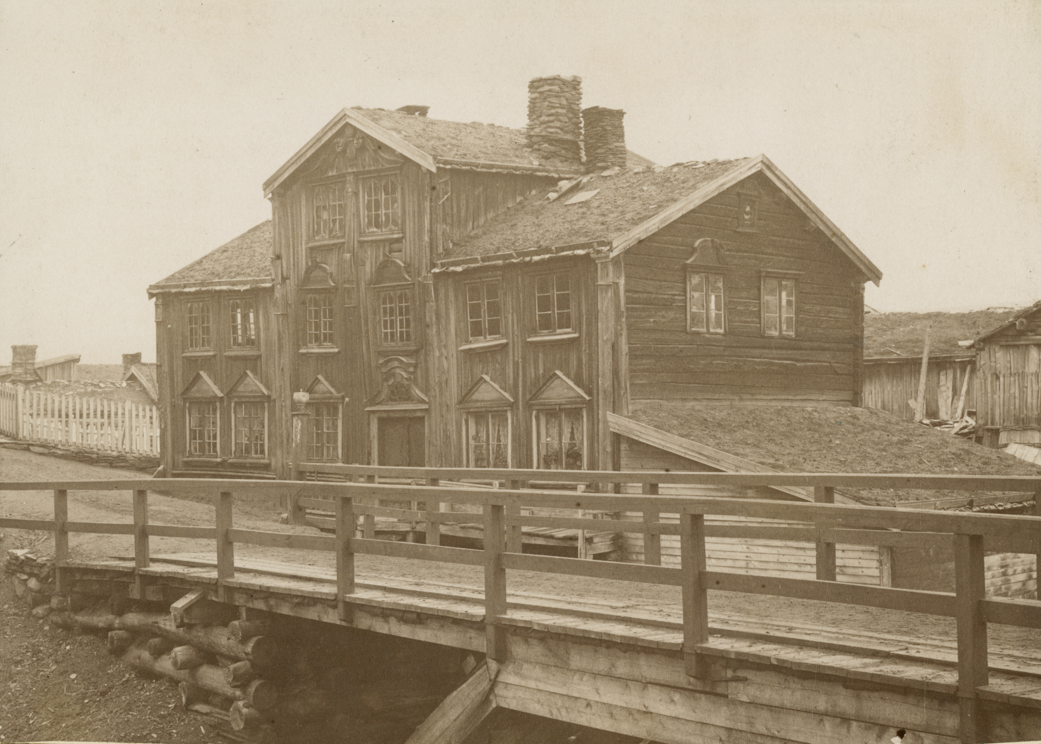 Aspåsgården i Røros by, Sør-Trøndelag Senere flyttet til Sverresborg museum. This image on crowdsourcing geotagging platform Fotodugnad